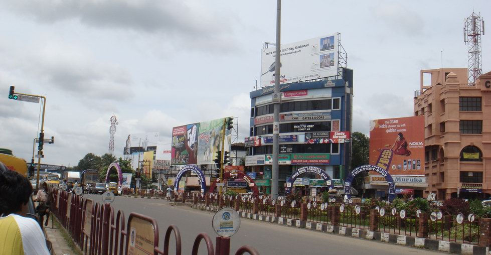 വൈറ്റില‌ജങ്ഷൻ